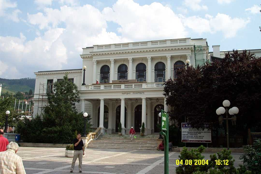 Národní divadlo (Narodno pozorište) v Sarajevu